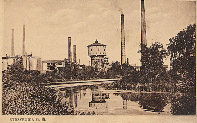 Polska Huta Skarbowa Ołowiu i Srebra w Strzybnicy (Górny Śląsk) Spółka Dzierżawna Tarnowskie Góry SA - pocztówka z czasów XX-lecia międzywojennego